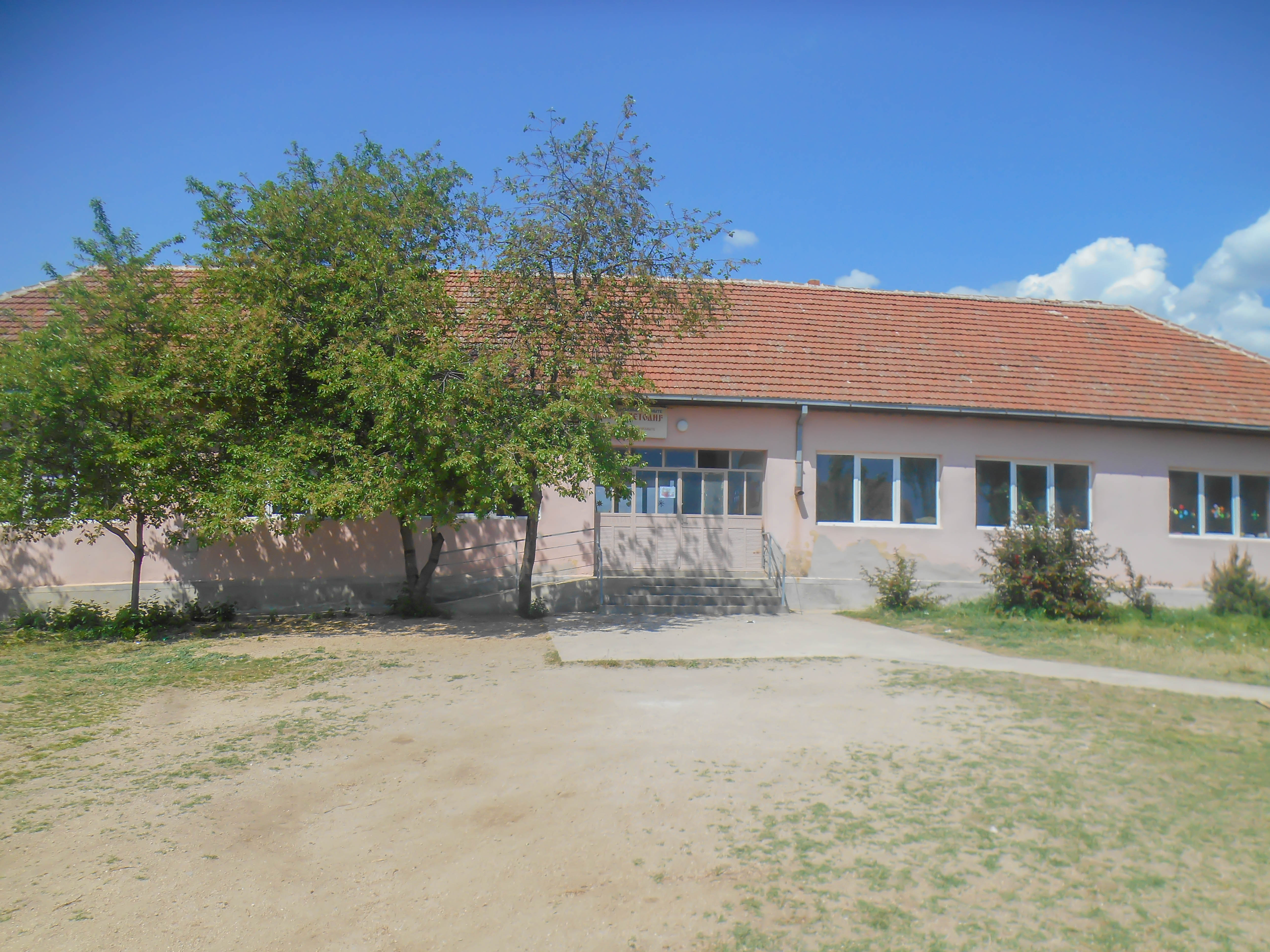 Основно училиште „Св. Кирил и Методиј“ - Секирник